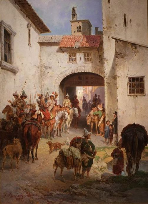 Башкиры во Франции в 1814 году